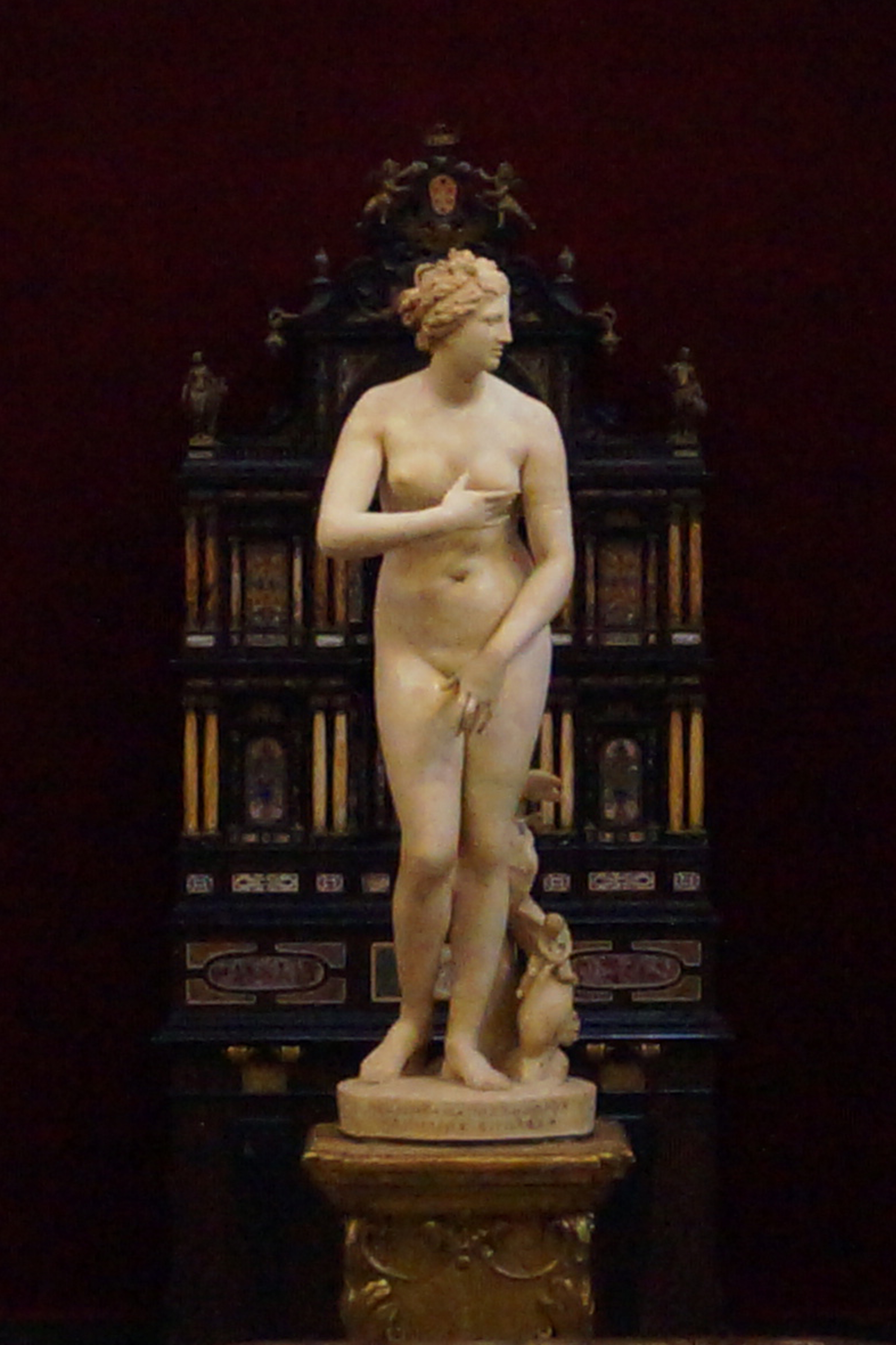 Статуя Венеры в Уффици